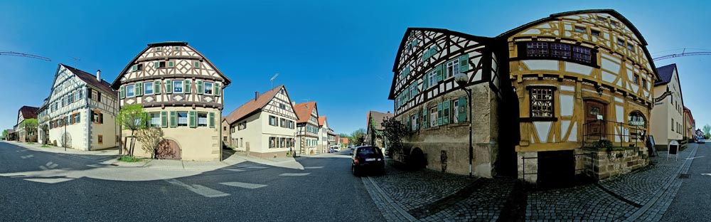 360°-Panoramabild in der Knittlinger Straße in Lienzingen vor dem historischen Fachwerkhaus des Restaurants „zum Nachtwächter“. Interaktive Version dieses Bildes: panoblog.de. Höhere Auflösungen und interaktive Versionen beim Autor erhältlich